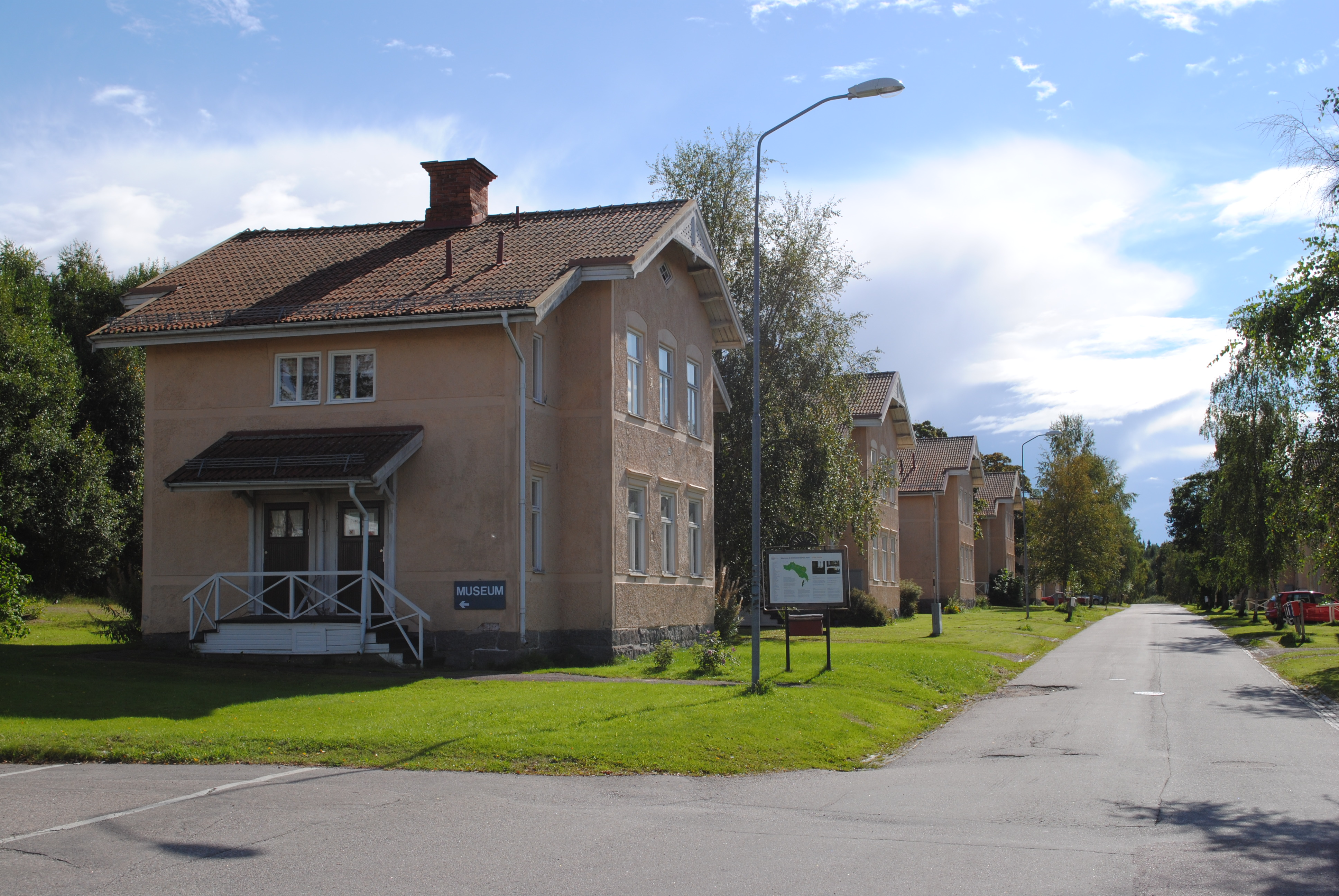 Stora Hagvägen i Grängesberg.